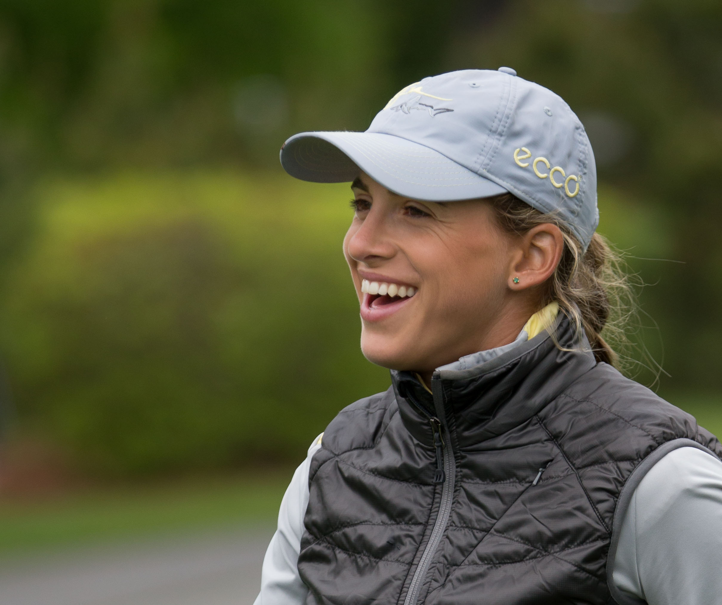 LPGA Kingsmill May 1, 2013